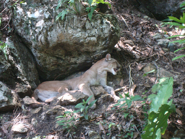 Pantera descansando en una de las cuevas de Petencito.